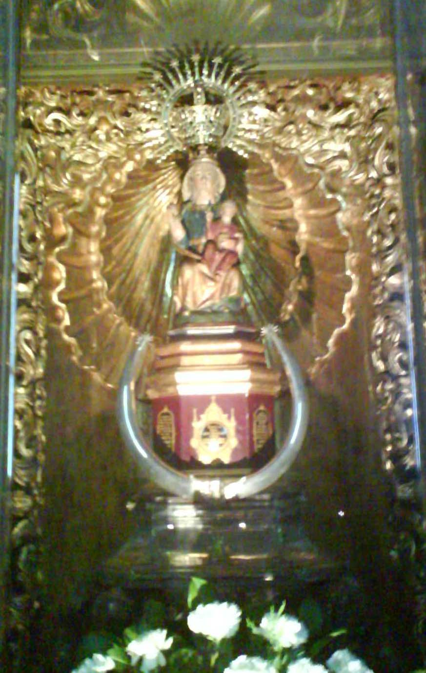 Imagen la virgen de Arrate en Eibar, Guipúzcoa (País vasco) (España).